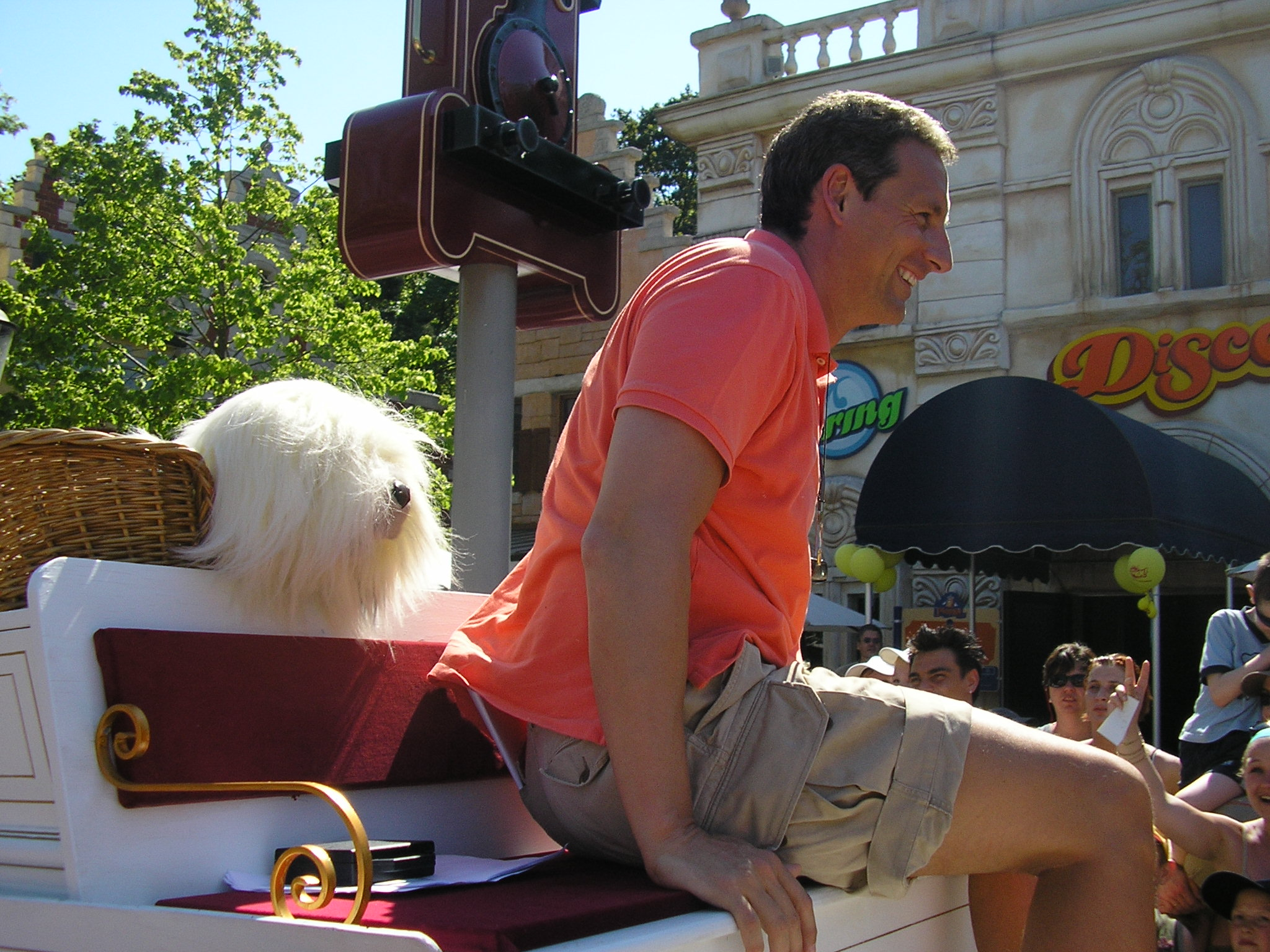 Foto die ik zelf gemaakt heb van Samson en Gert, in Plopsaland